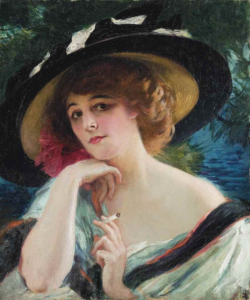 Le regard séducteur